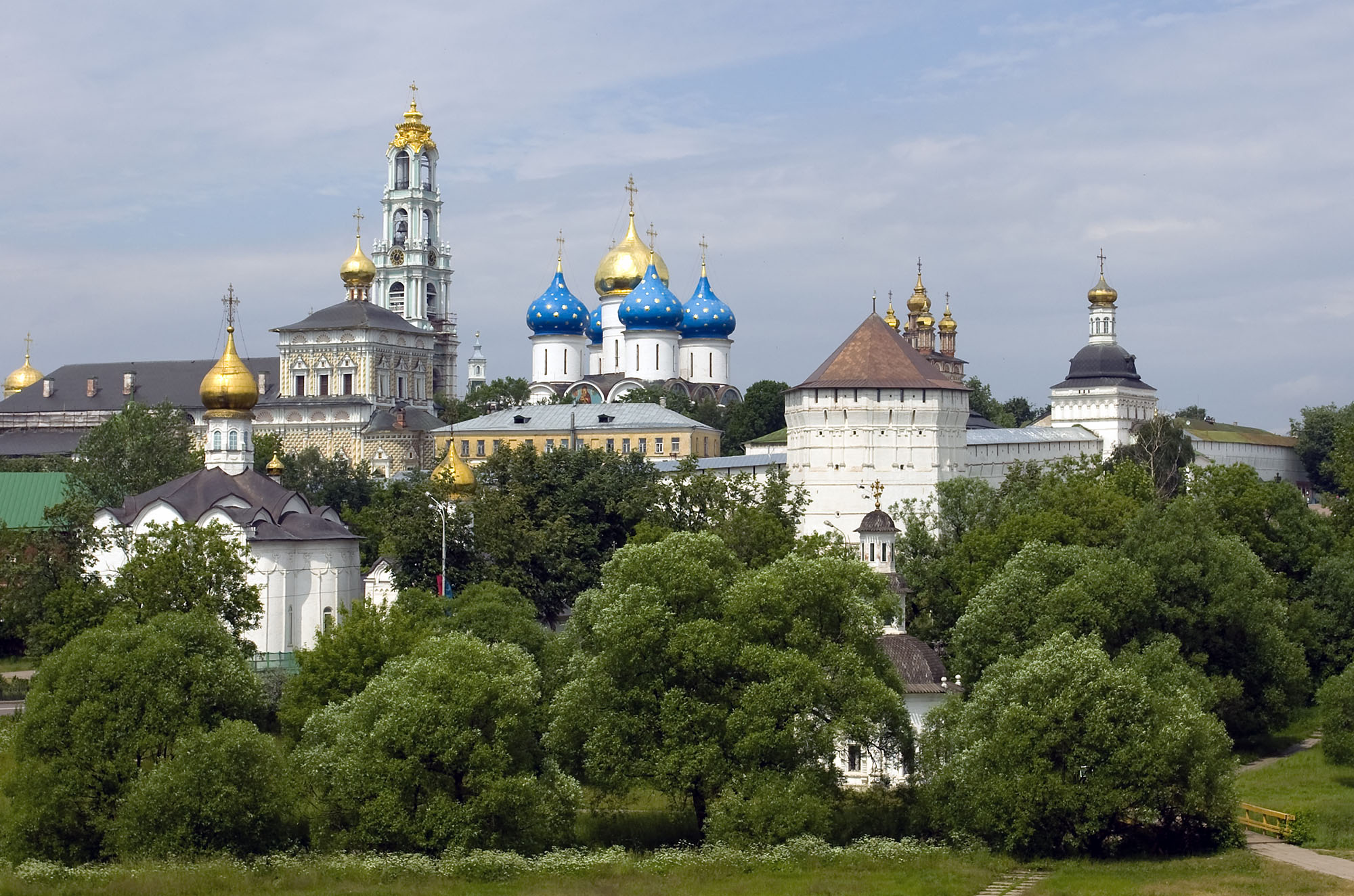 Troitse-Sergiyeva Lavra / Sergiyev Posad, Russia